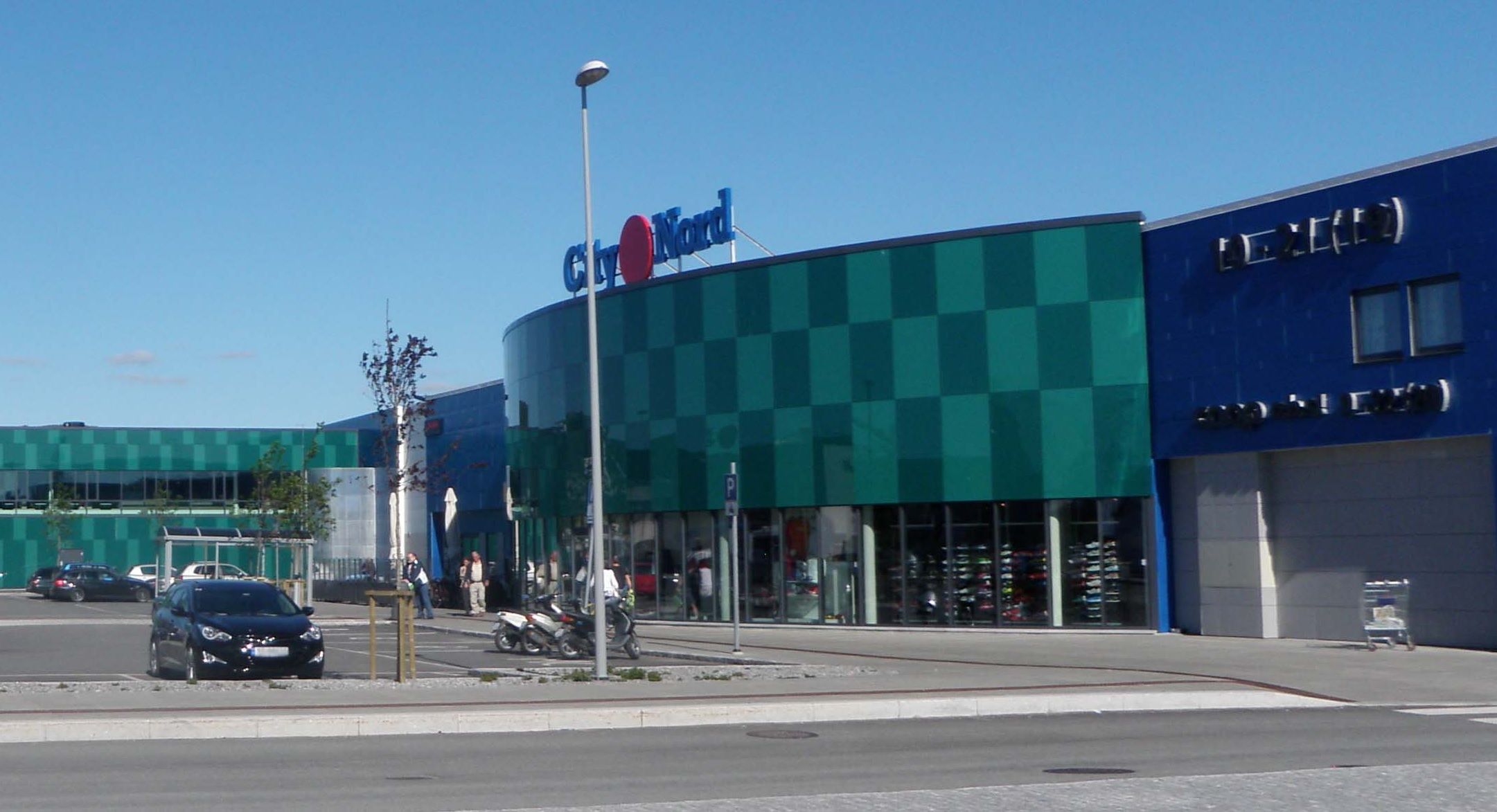 Den nordvestlige inngangen på kjøpesenteret City Nord i Bodø